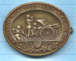 8. Bayerisches Reserve-Feldartillerie-Regiment (8. Bay. Reserve-Division ), Weltkriegs-Erinnerungs-Abzeichen 1914-18